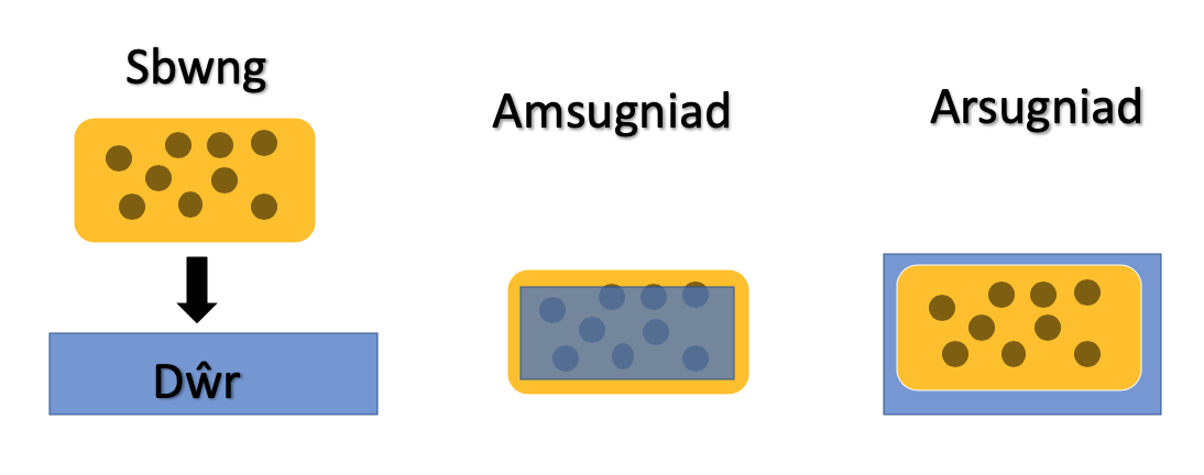 Enghraifft o amsugniad ac arsugniad yn ddefnyddio sbwng a dŵr. Amsugniad (chwith), dŵr yn truddio i ganol (swmp) y sbwng. Arsugniad (de), dŵr yn ymlynu i arwyneb y sbwng yn unig.